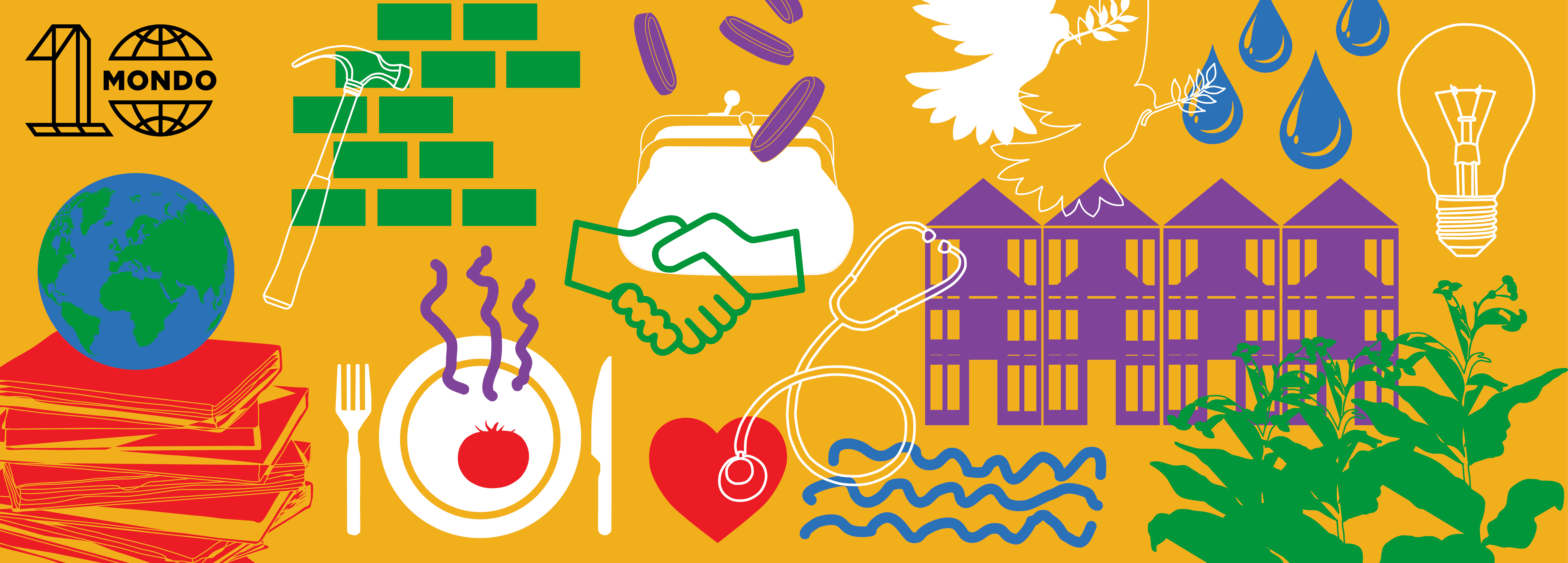 Pilt valmis MTÜ Mondo Vikipeedia konkursi reklaamimise eesmärgil. Kujunduses on kasutatud MTÜ Mondo logo ja kestliku arengu eesmärke kajastavat sümboolikat.